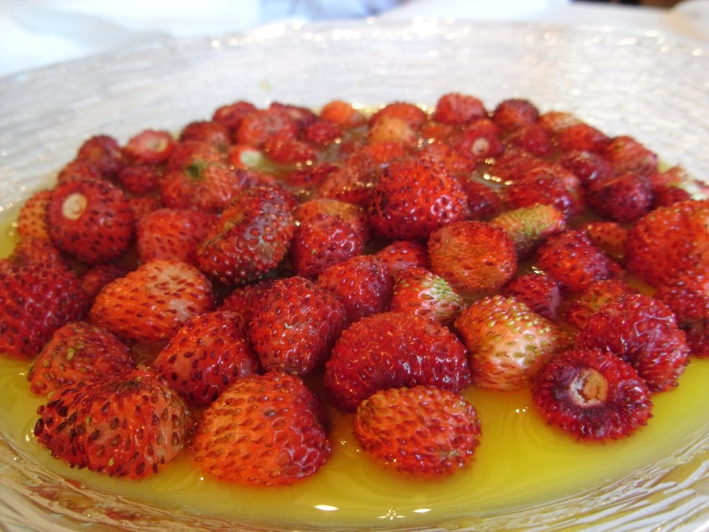 Fresitas de Temporada con Zumo de Naranja